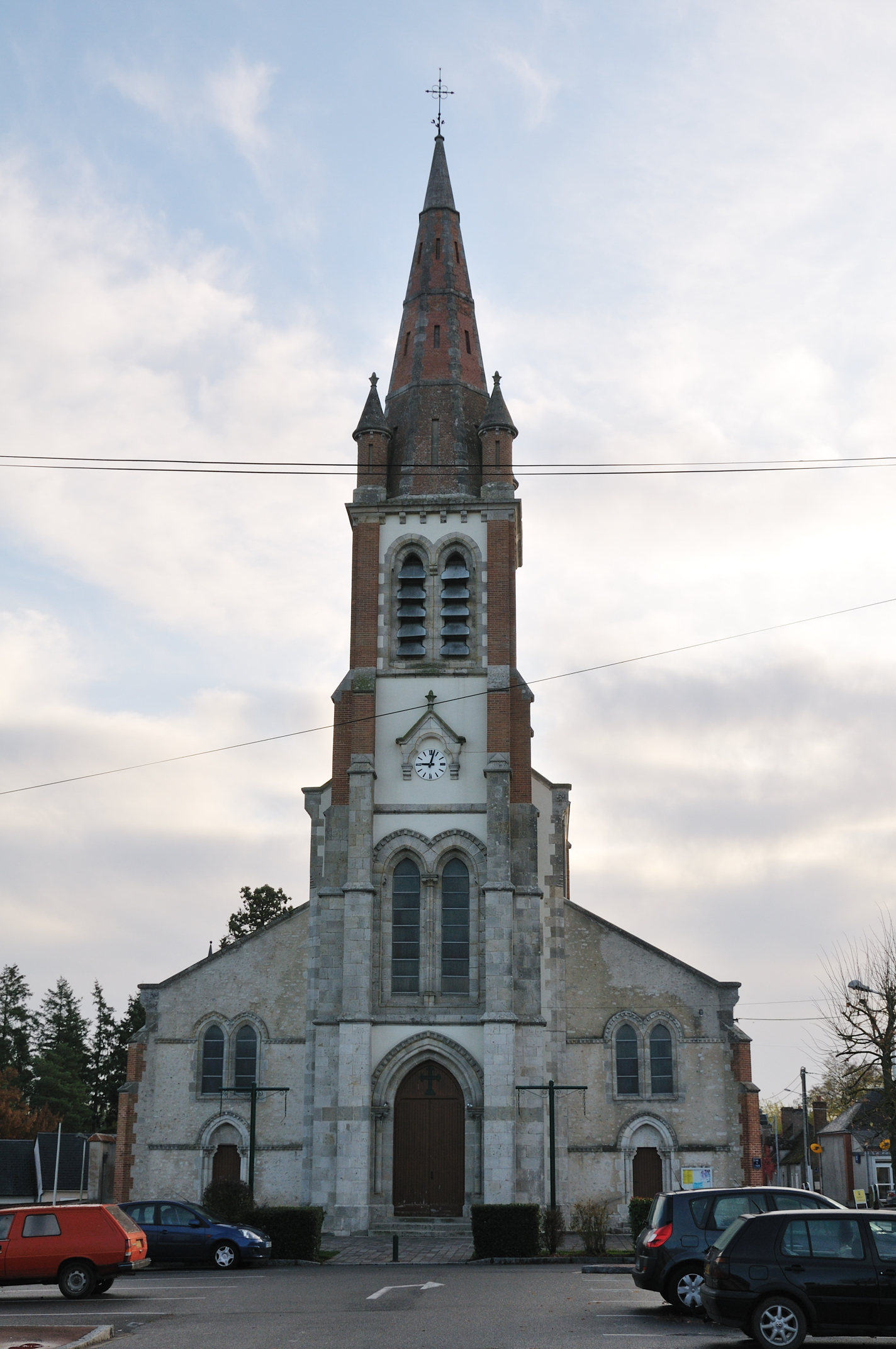 Église Saint-Martin, Tigy, Loiret, France